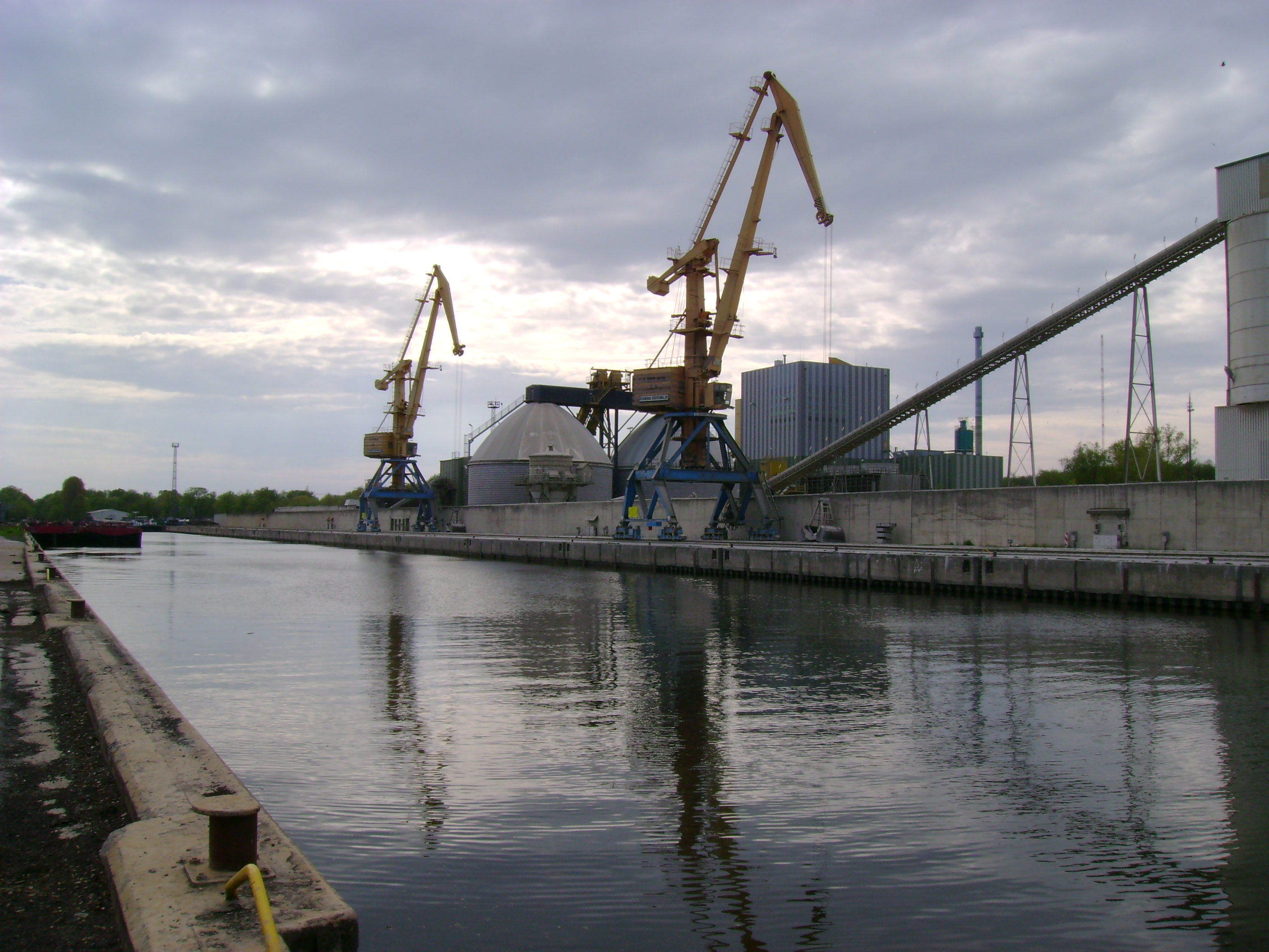 Nordhafen des Hafens Königs Wusterhausen